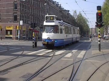 Beijnestram in Amsterdam. Oude gelede tram 623 op de grand union Ceintuurbaan / Ferdinand Bolstraat; voor 2003.